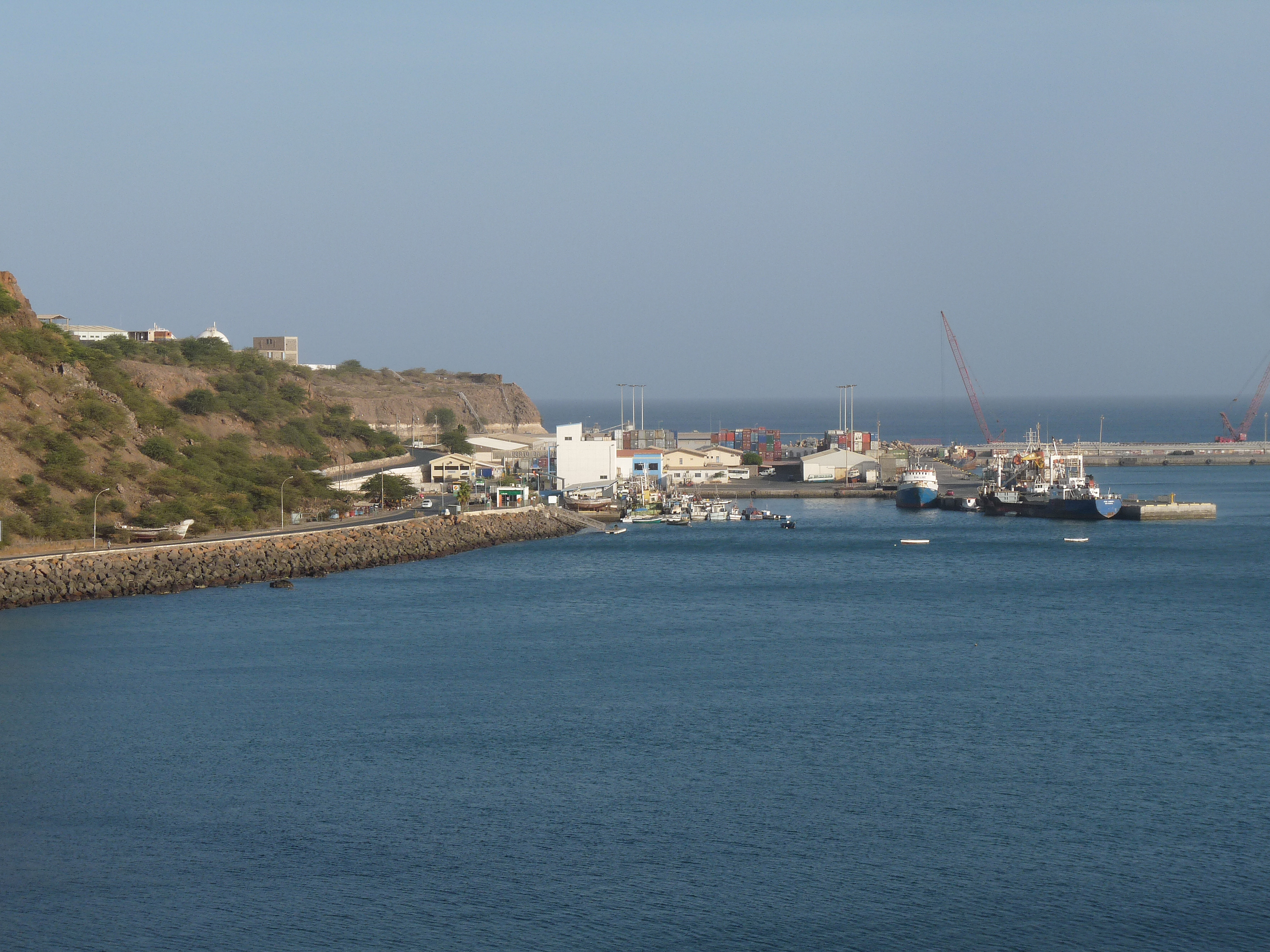 Praia (Cap-Vert) : le port